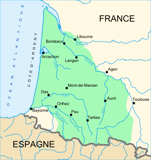 Carte de la Gascogne (Sud Ouest de la France)